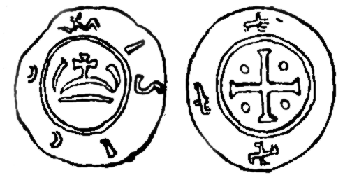 Denar Mieszka I z legendą MISICO (wedle wcześniejszych ustaleń) lub Mieszka II (wedle hipotezy prof. S. Suchodolskiego monety te bił Mieszko II jako następca tronu, jeszcze przed 1025 rokiem).